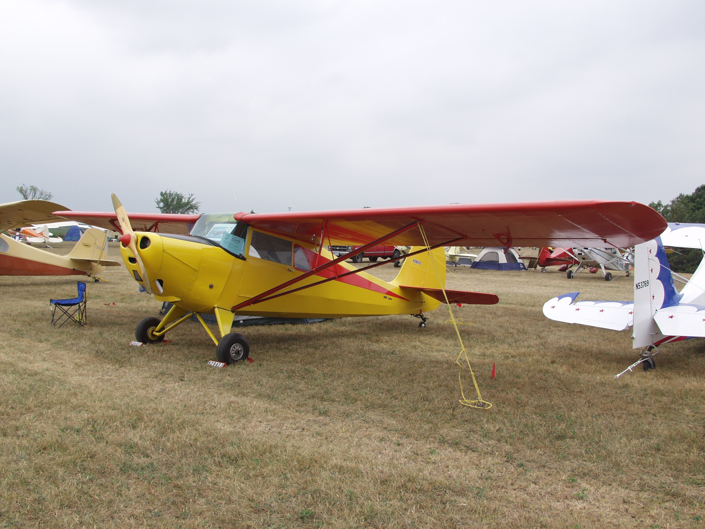 Aeronca 65-CA